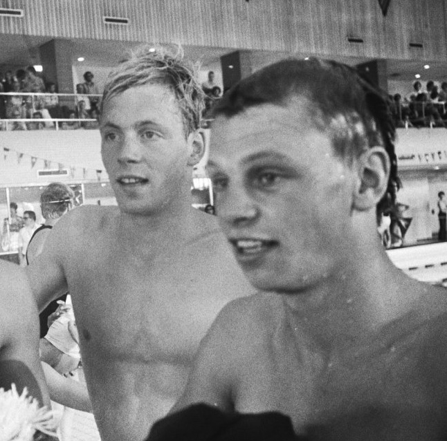 André in het Veld (left), René van der Kuil